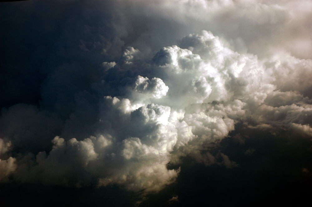 മേഘം